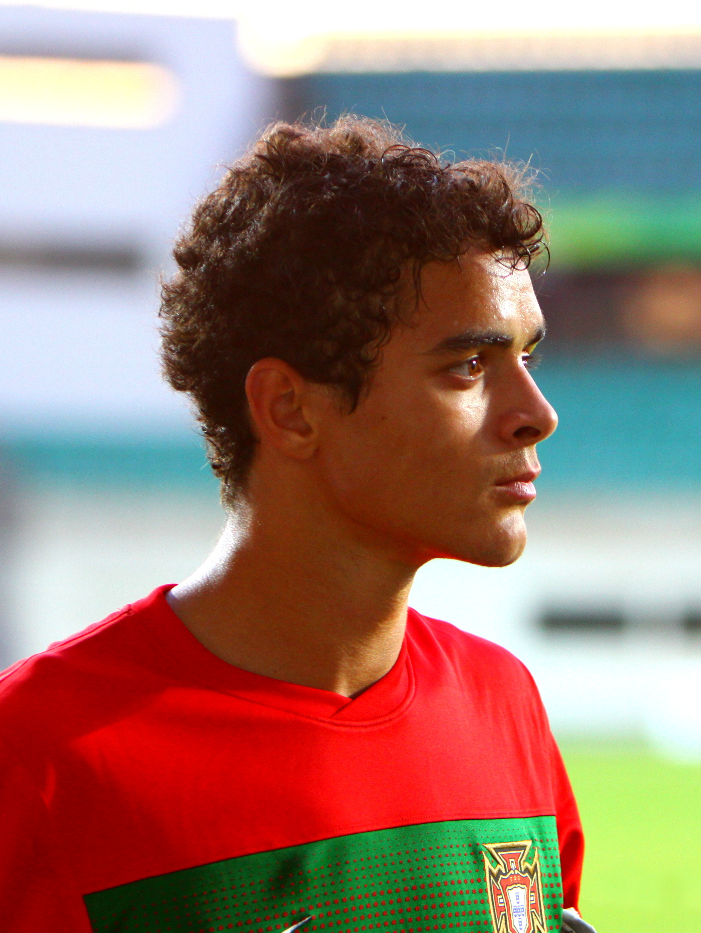 U-19 Estonia vs Portugal.